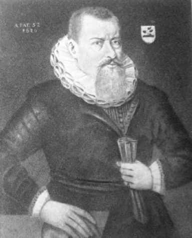 Kupfermeister Jeremias Hoesch